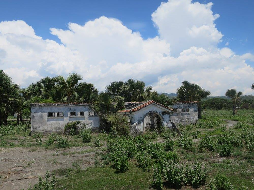 Edificio das Alfandegas, Betano